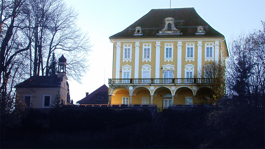 Schloss Annabichl in Klagenfurt 1580 von Georg Khevenhüller erbaut